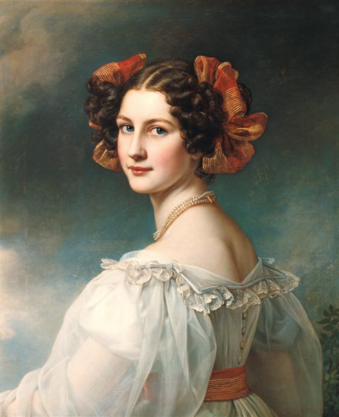 Auguste Strobl (später Hilber) aus der Schönheitengalerie